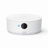 Das NFC Lese -Schreibgerät ermöglicht es einem 3DS Amibos zu Lesen und Daten Darauf zu speichern. (Wird auch dafür um auch andere Figuren lesen zu können